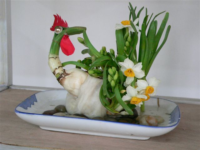 雕刻水仙 2005年2月6日拍摄于北京北海公园阐福寺花展 Carved Narcissus bulb at Beihai Park, Beijing, Temple Flower Show Category:花卉